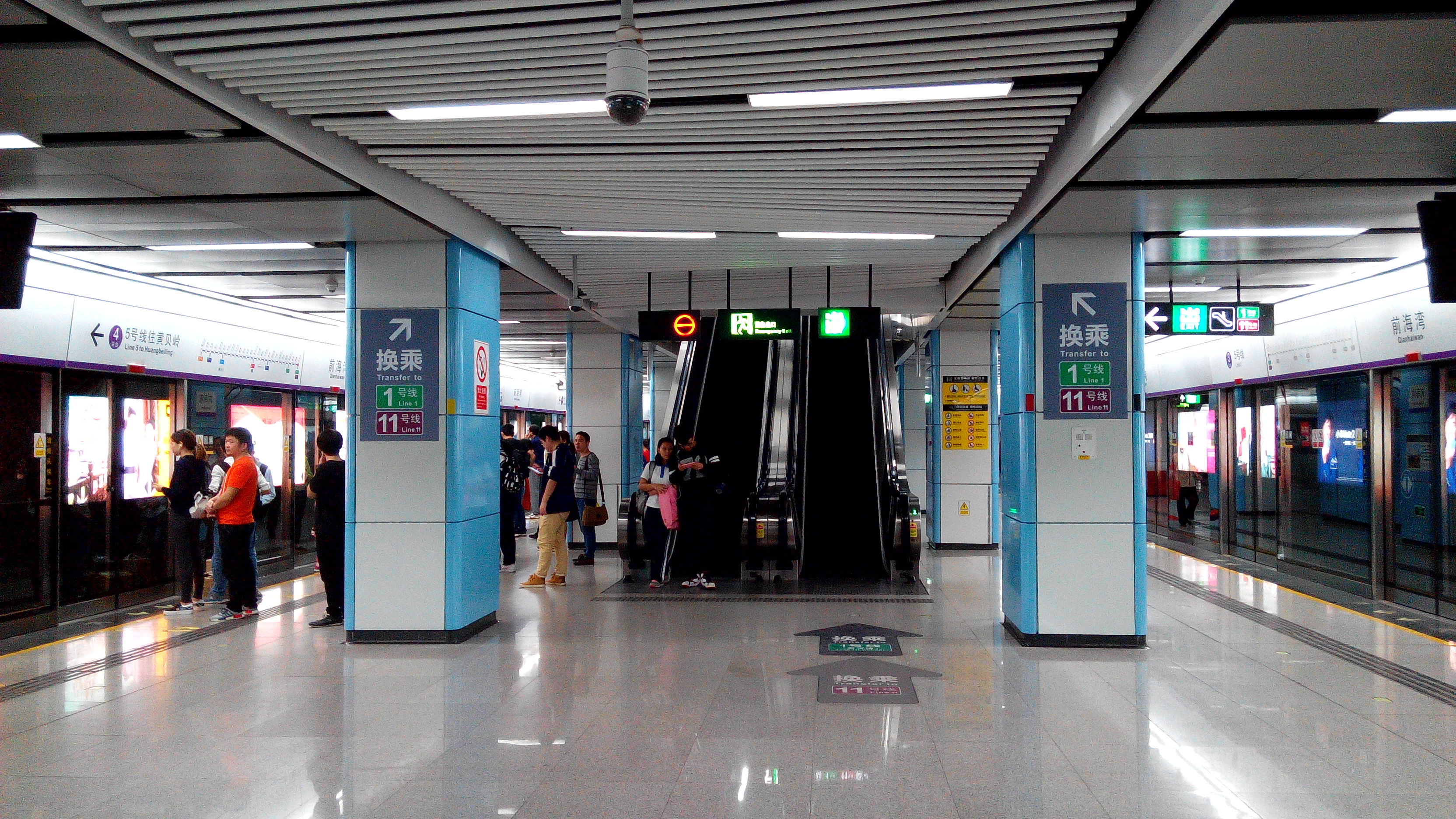 深圳地铁1、5号线 前海湾站2、4号站台